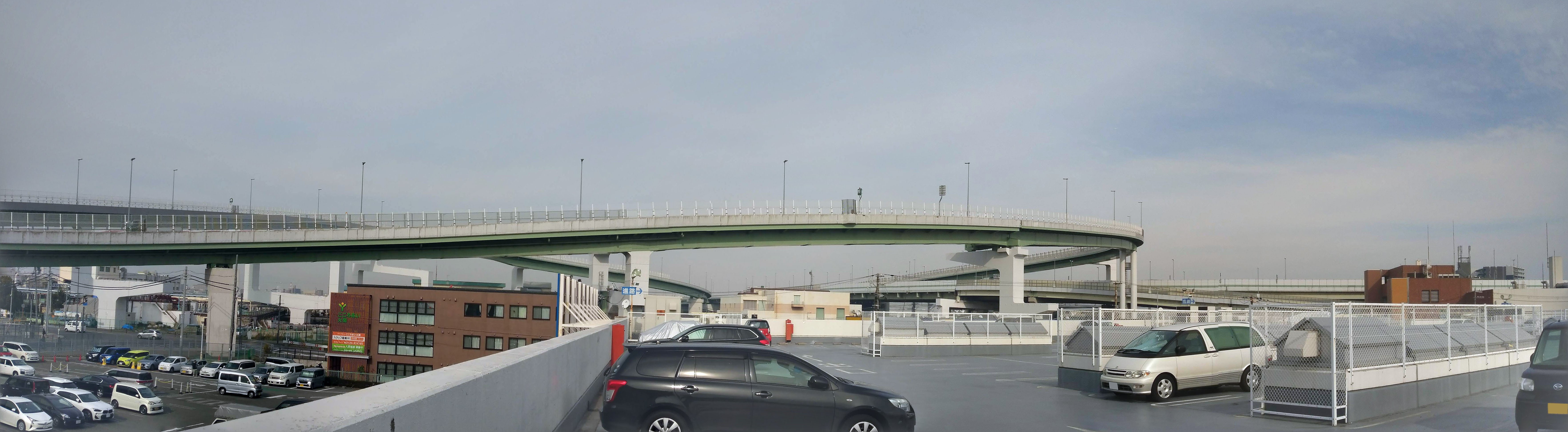 海老江ジャンクション南のコーナン屋上駐車場より、複数枚撮影したものをパノラマ合成。左が淀川左岸線、右が神戸線大阪方、奥が神戸線神戸方